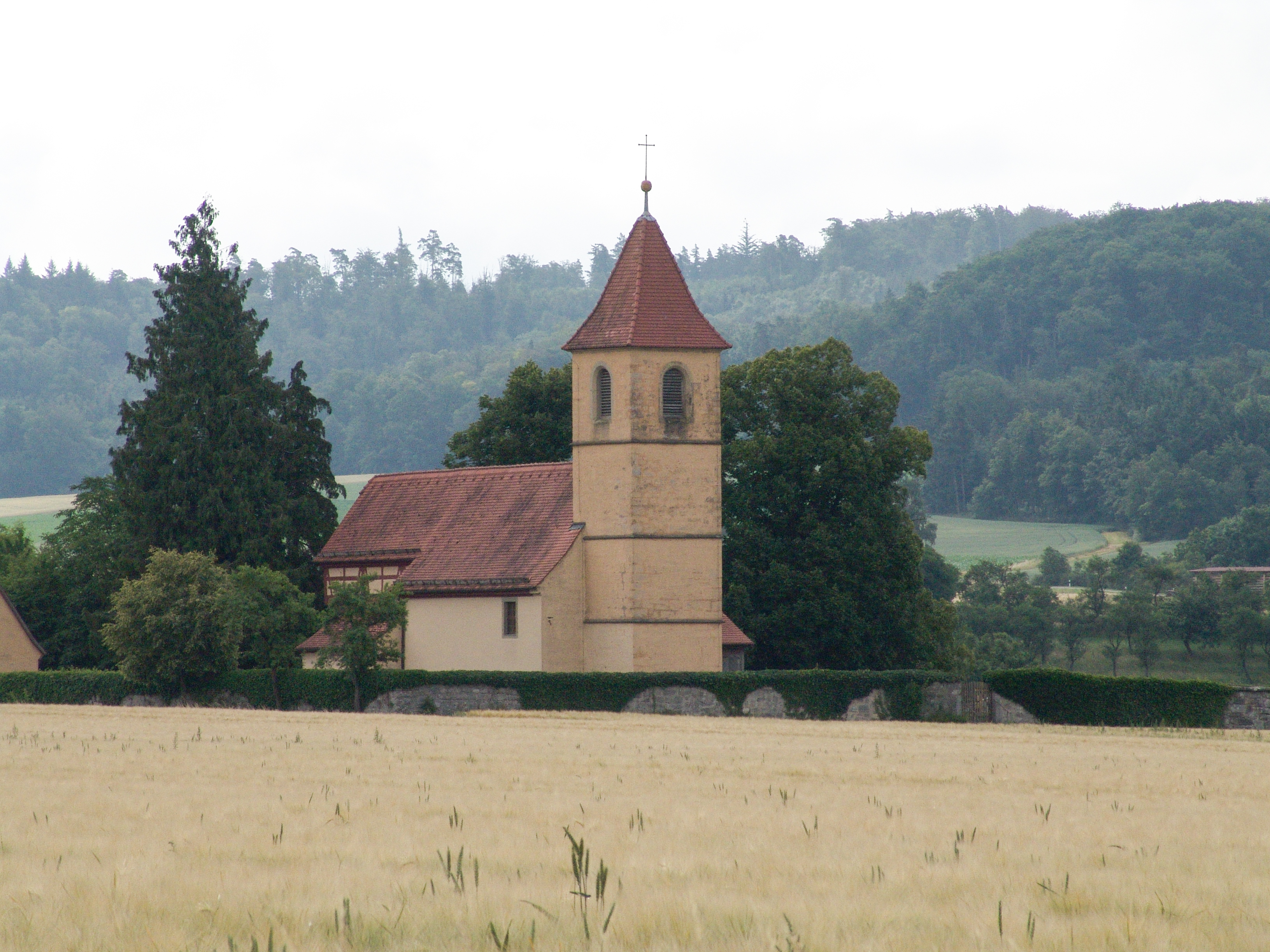 Kirnberg St. Maria und Michael